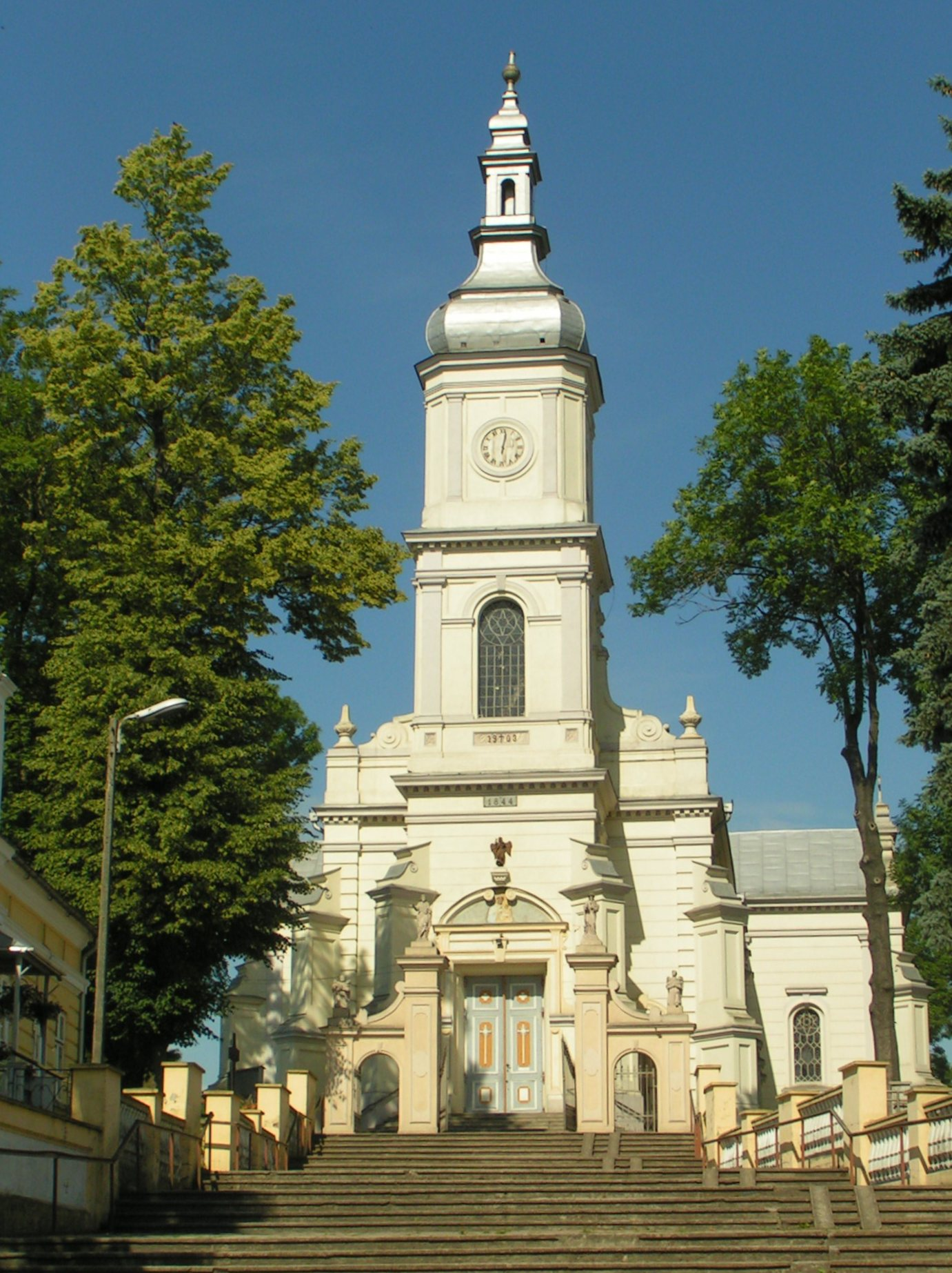 Kościół parafialny p.w. św. Stanisława w Kramsku w woj. wielkopolskim (zabytek nr rejestr. 522/263)